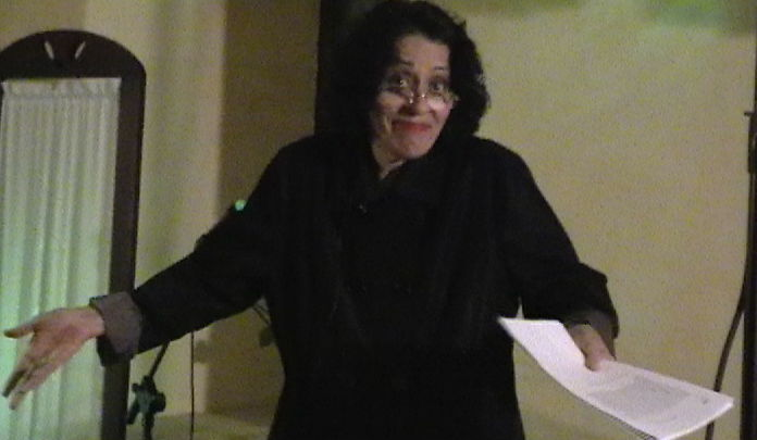 Giselda Castrini durante le prove di un recital